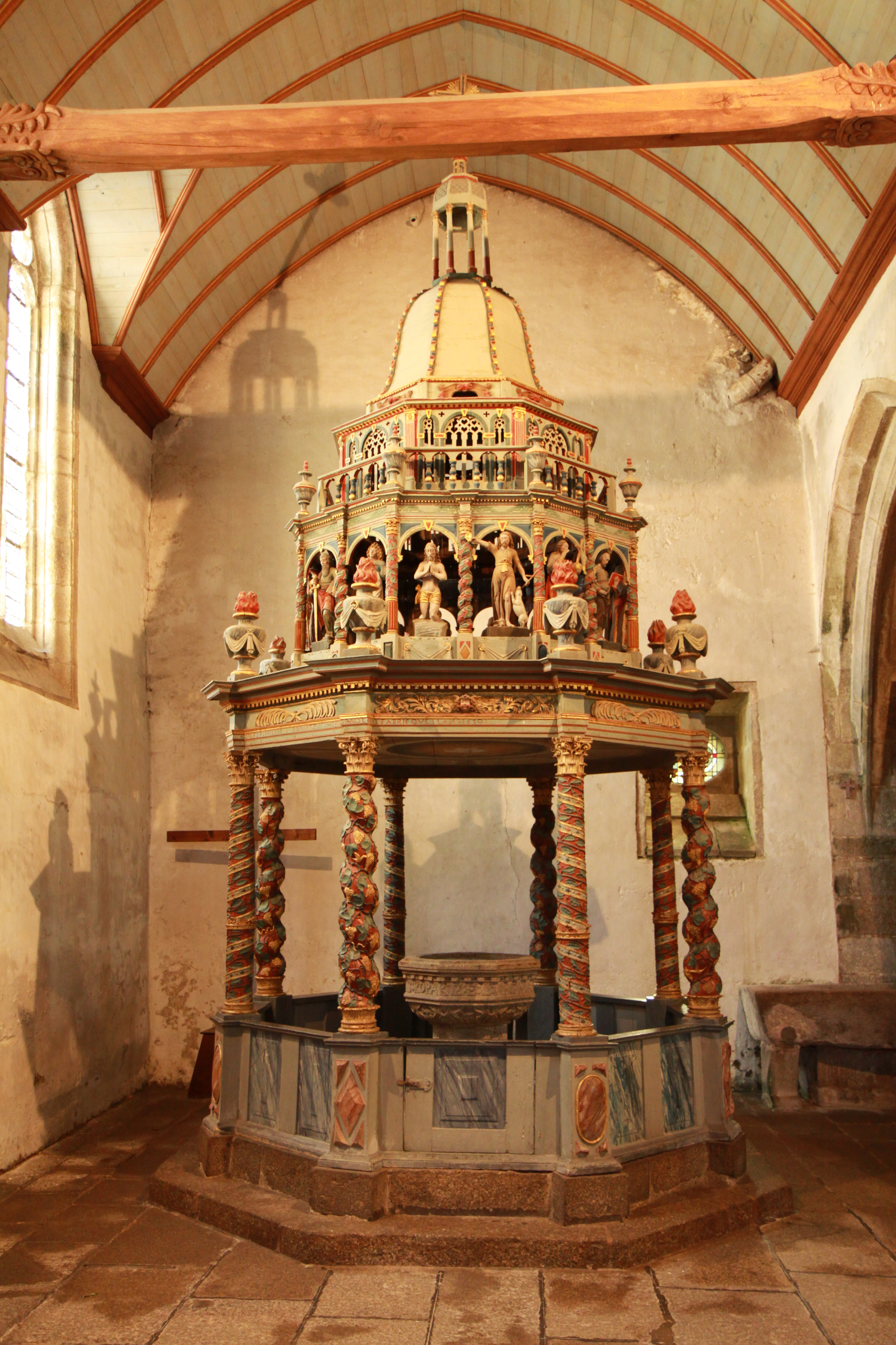 Vue de l'enclos paroissial de Lampaul-Guimiliau.